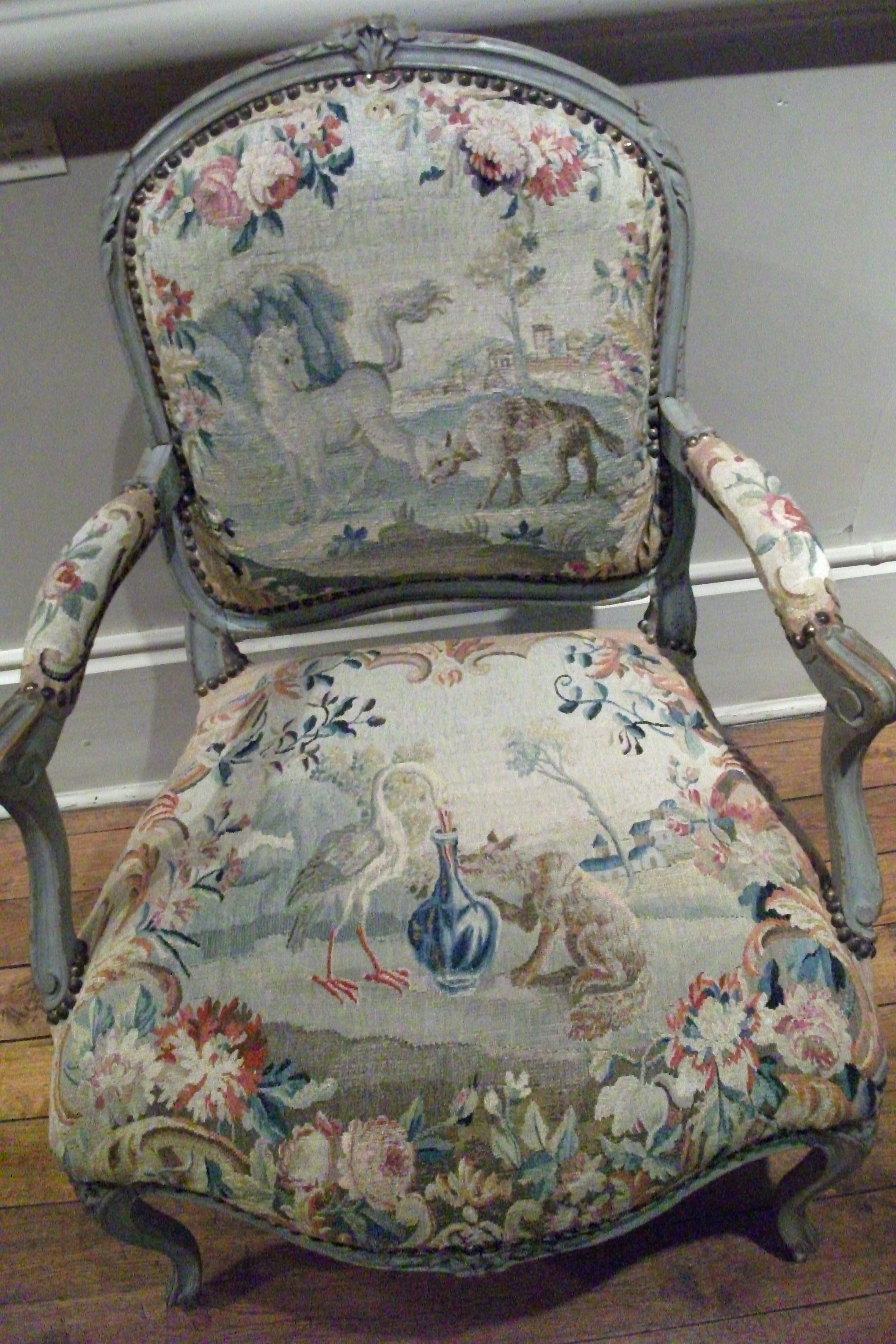 fauteuil provenant d'un lot de huit se situant au château de Sarry exposé au musée de chalons. le cheval et le loup aisin que le renard et la cigogne.